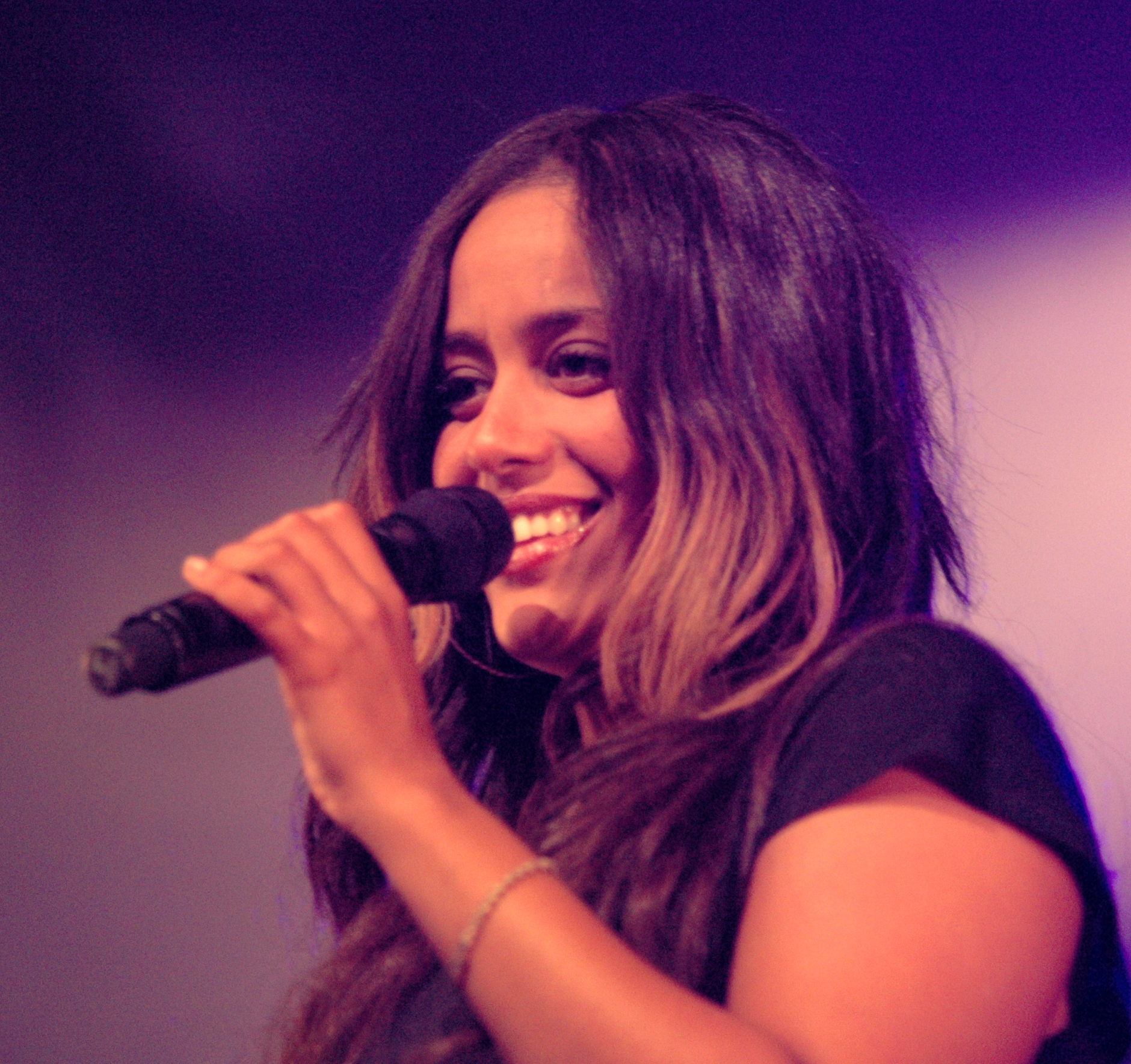 photo de amel bent